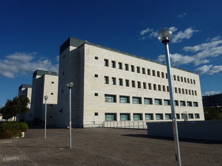 Nuovo polo didattico dell'Università degli Studi "Gabriele d'Annunzio"